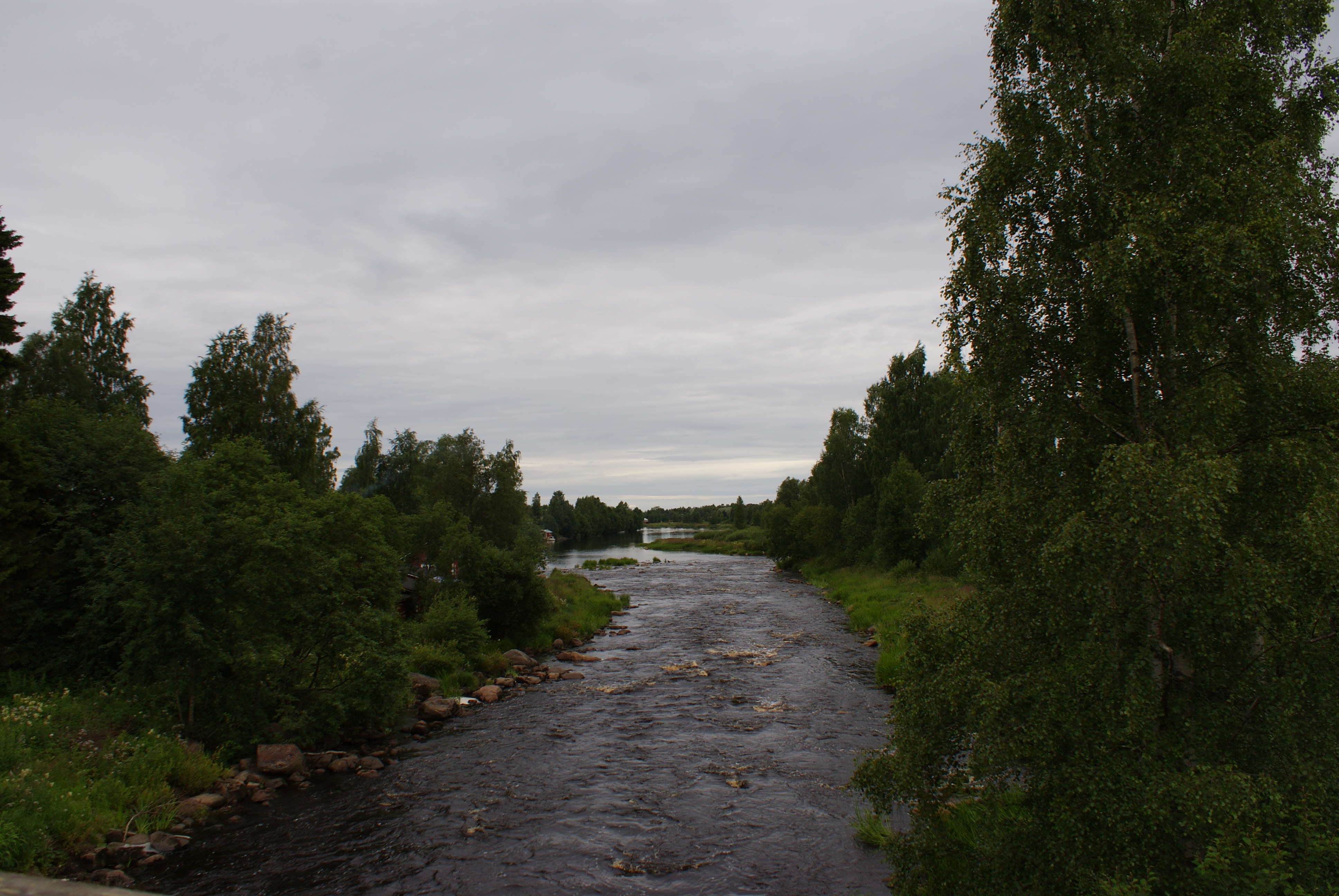 Lestijoki sedd från gamla bron i Himango.